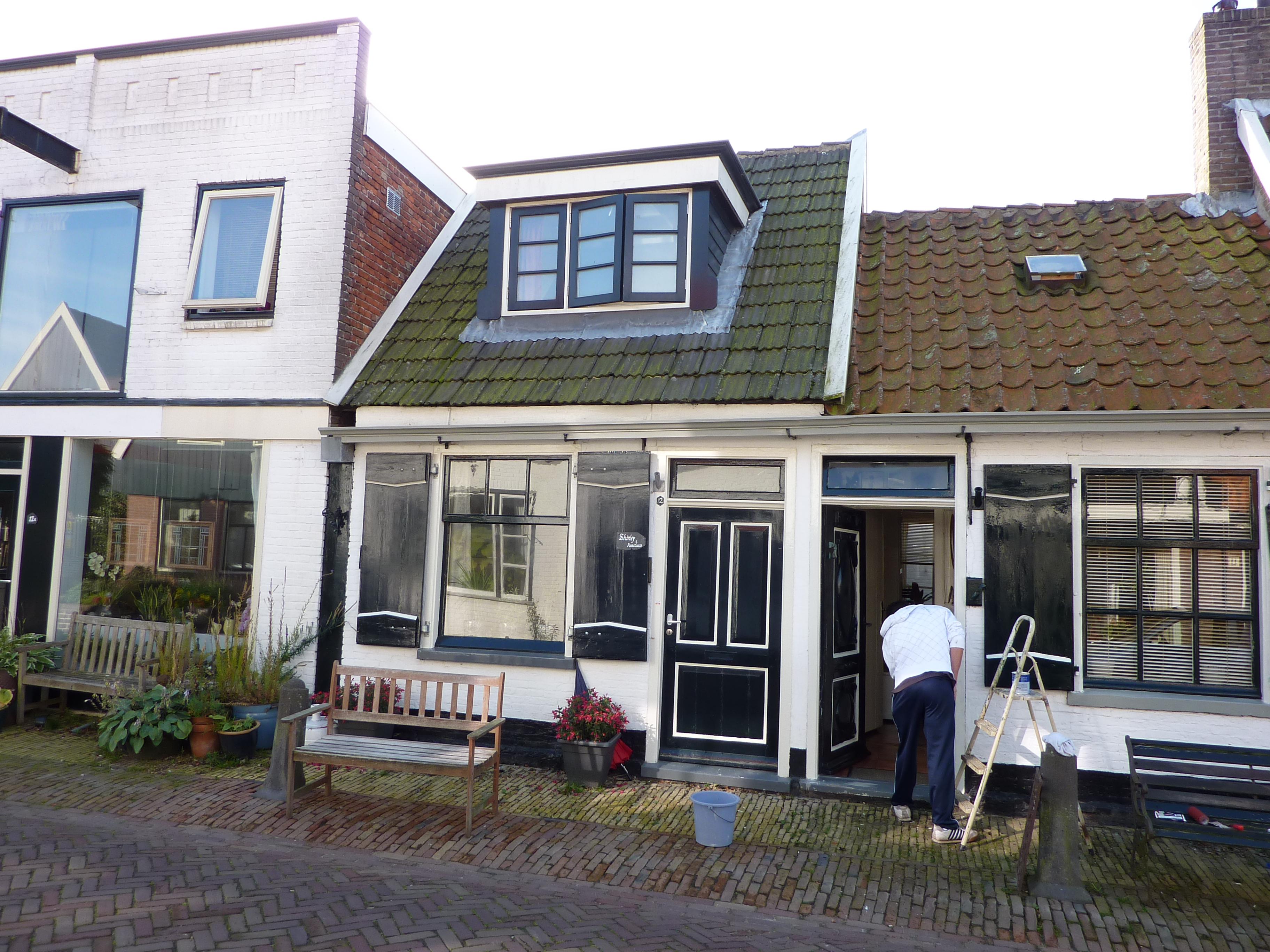 Woonhuis - Peperstraat 12, Oosterend, Texel